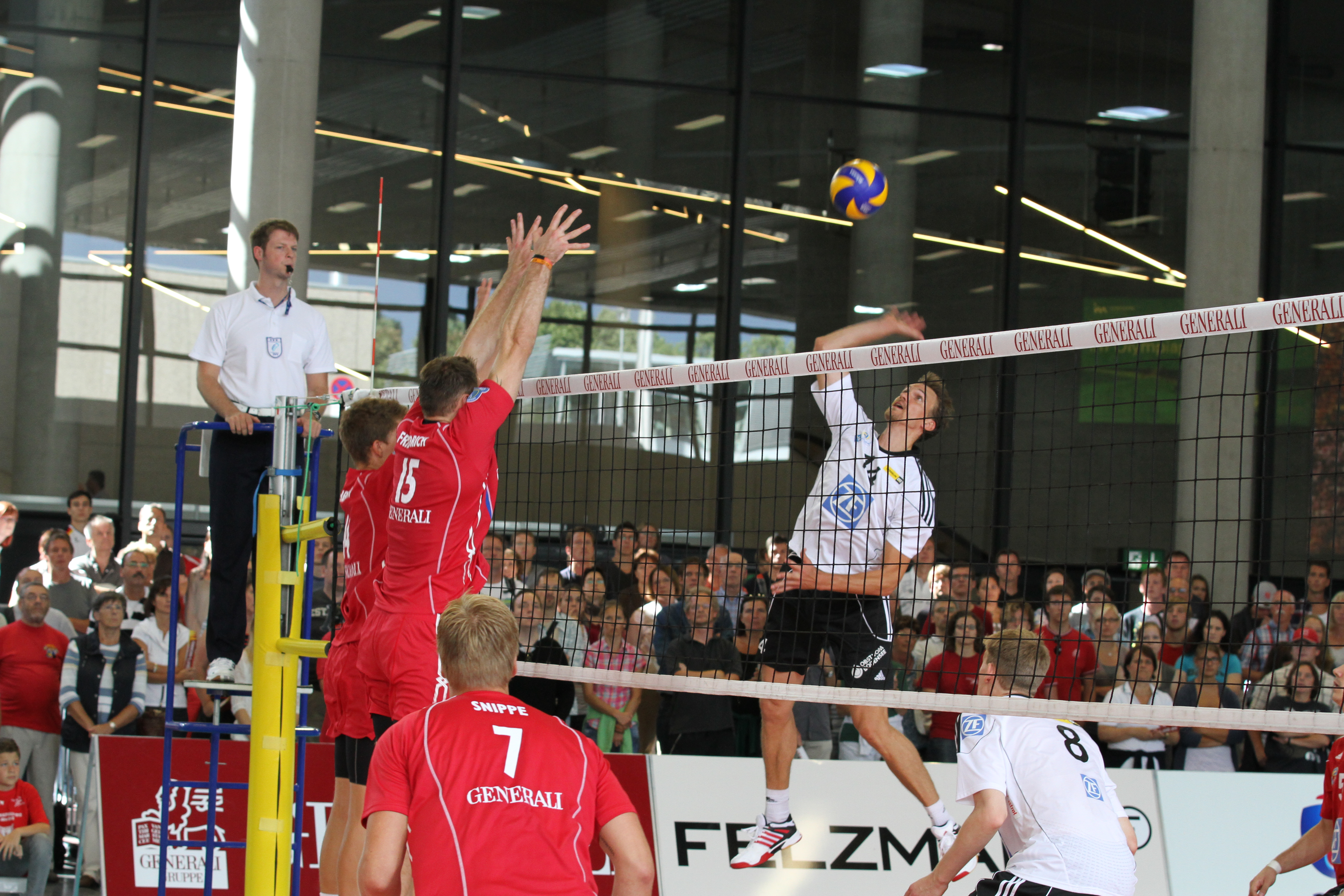 Volleyballspiel TSV Unterhaching - VfB Friedrichshafen, am 26. August 2012 in der Münchner Kleinen Olympiahalle. Das Spiel diente der Saisonvorbereitung.